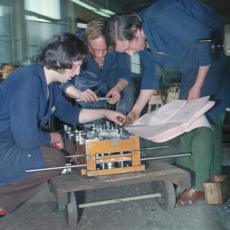 Original image description from the Deutsche Fotothek Facharbeiter für Fertigungsmittel